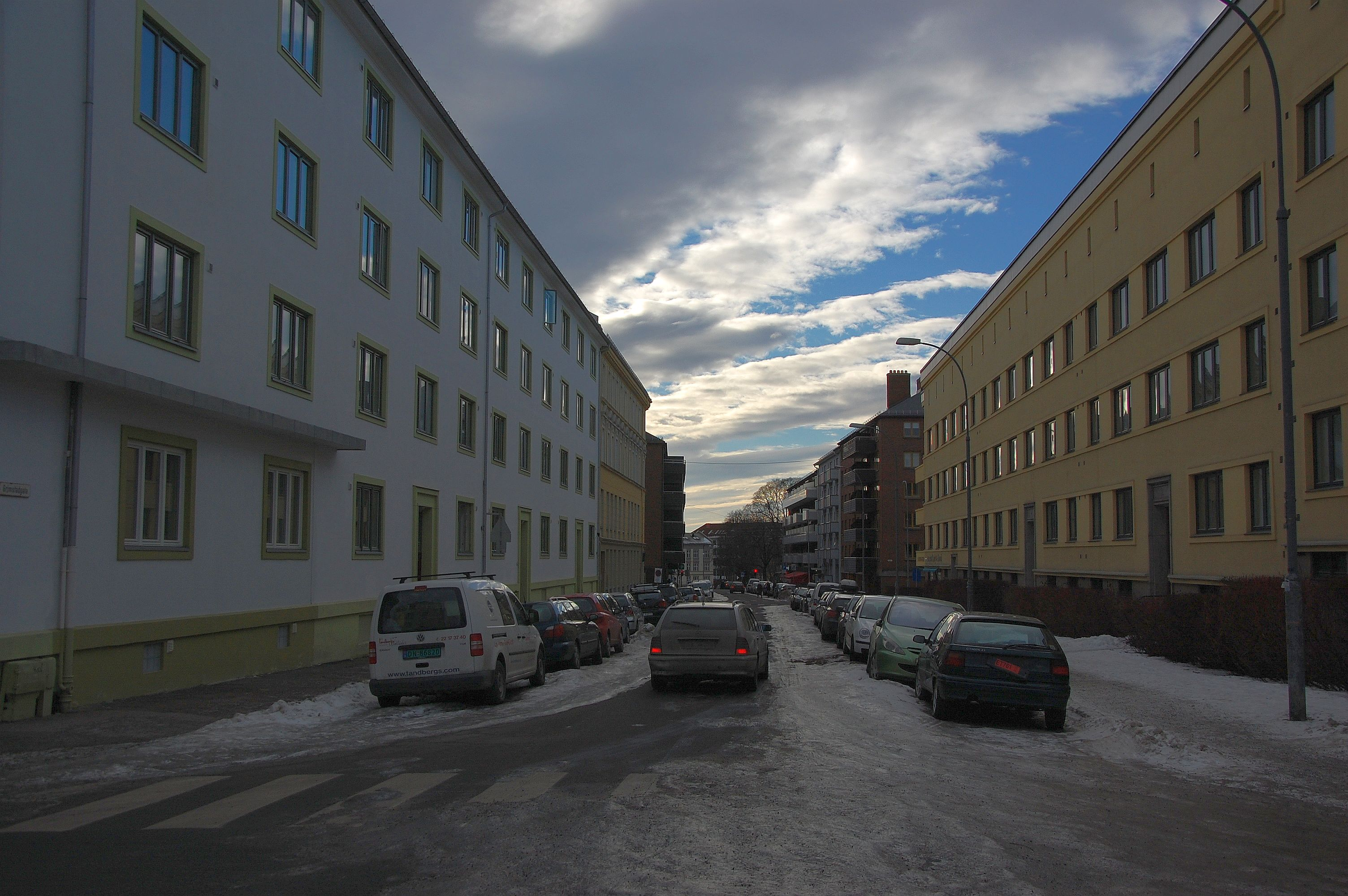 Grimstadgata sett fra Mogata i retning Arendalsgata